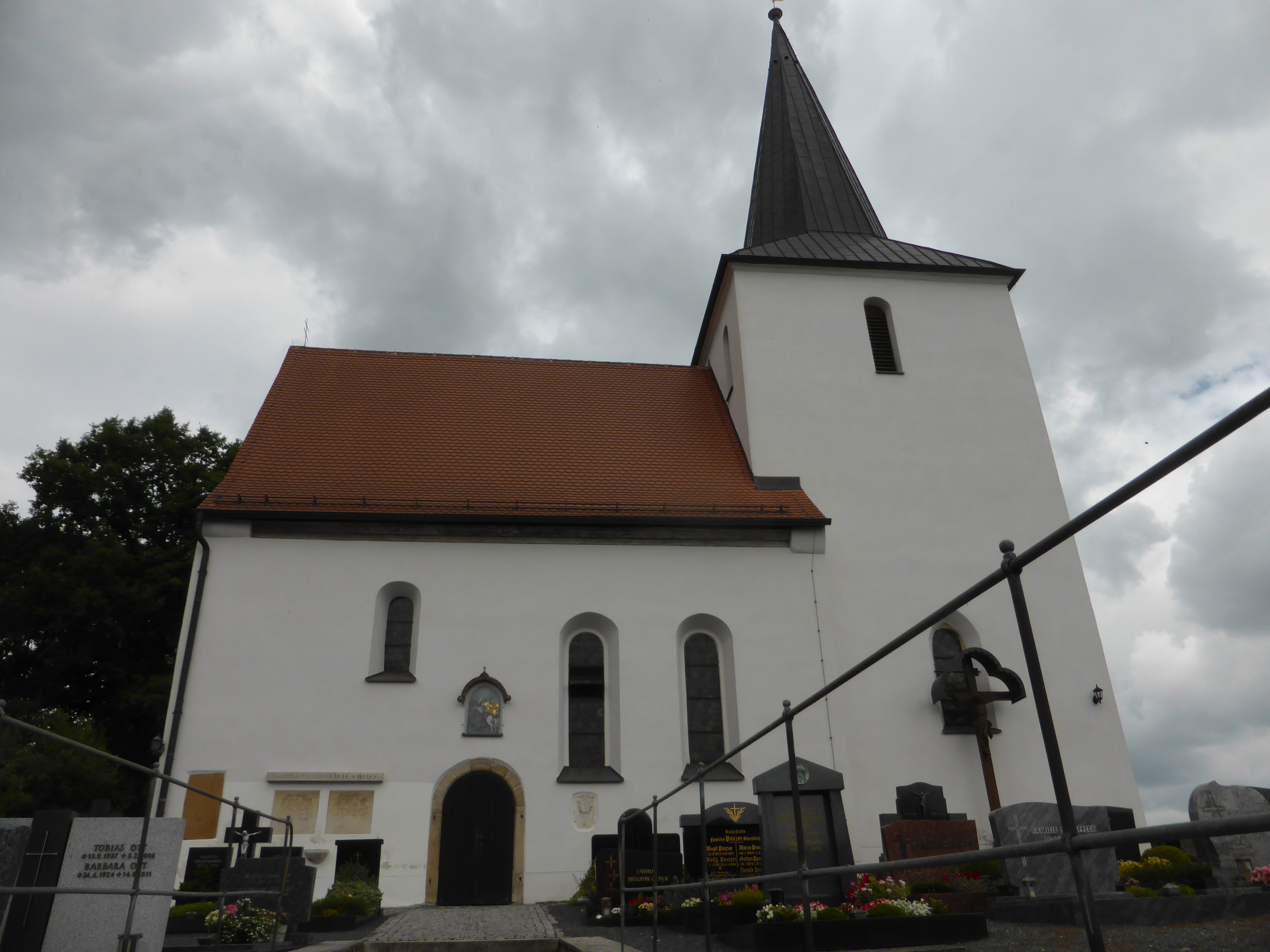 Katholische Filialkirche Sankt Georg (Oberndorf)